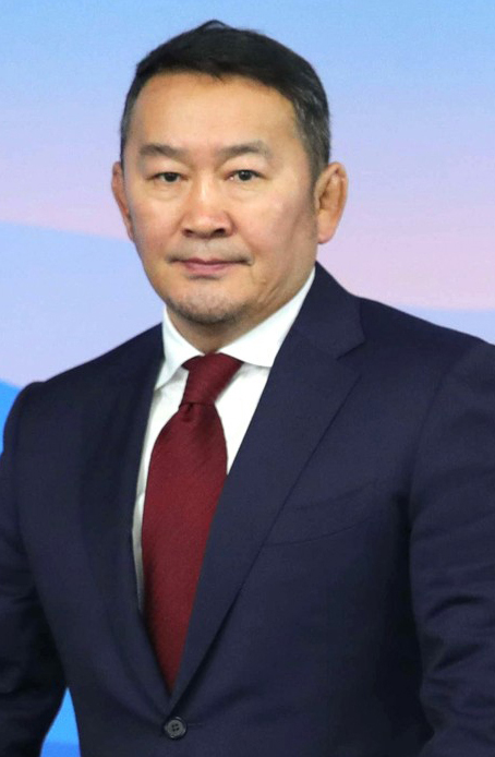 Президент Монголии Халтмагийн Баттулго во время встречи с Президентом России Владимиром Путиным